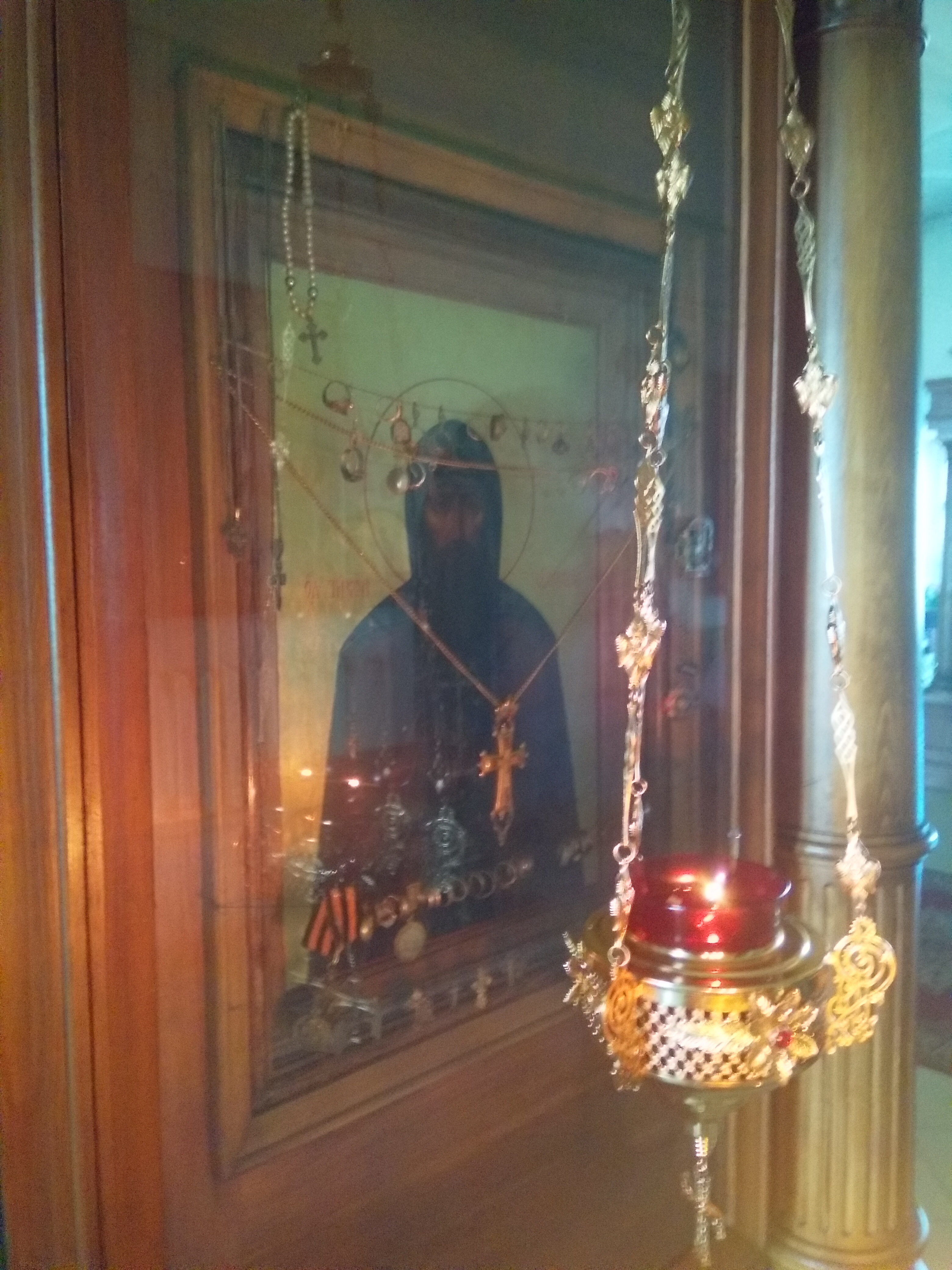 Неизрубаемая икона Тихона Луховского, Николо-Тихонов монастырь, село Тимирязево, Лухский район, Ивановская область